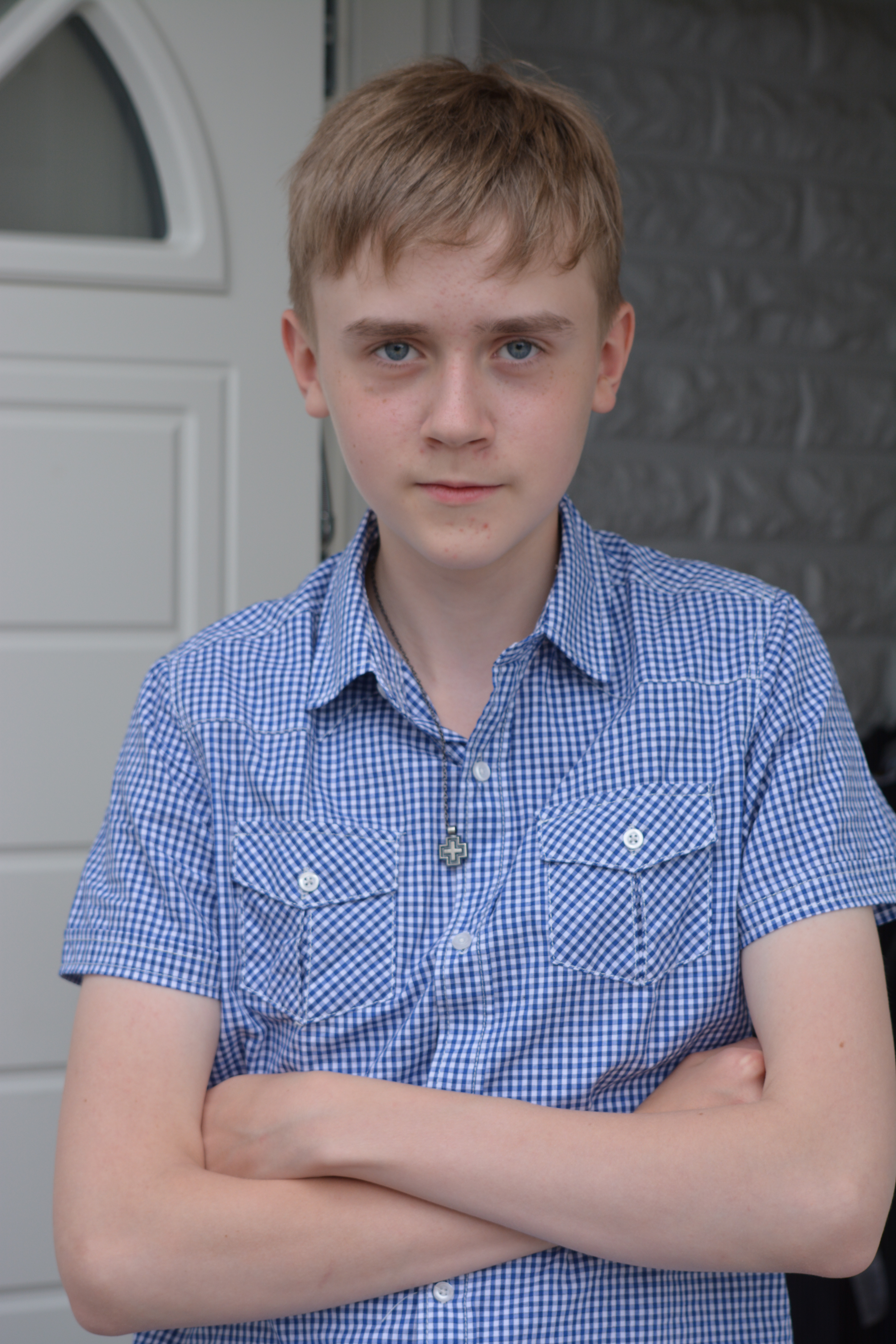 Nuori päätoimittaja Tuomas Kuhalainen vuonna 2015.